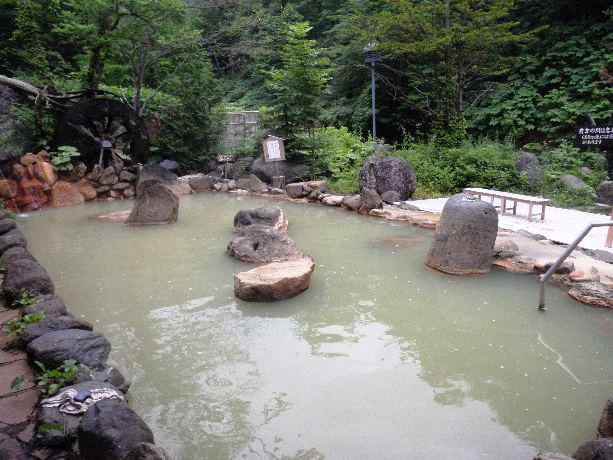 天人峡温泉、天人閣の露天風呂（水車露天風呂）